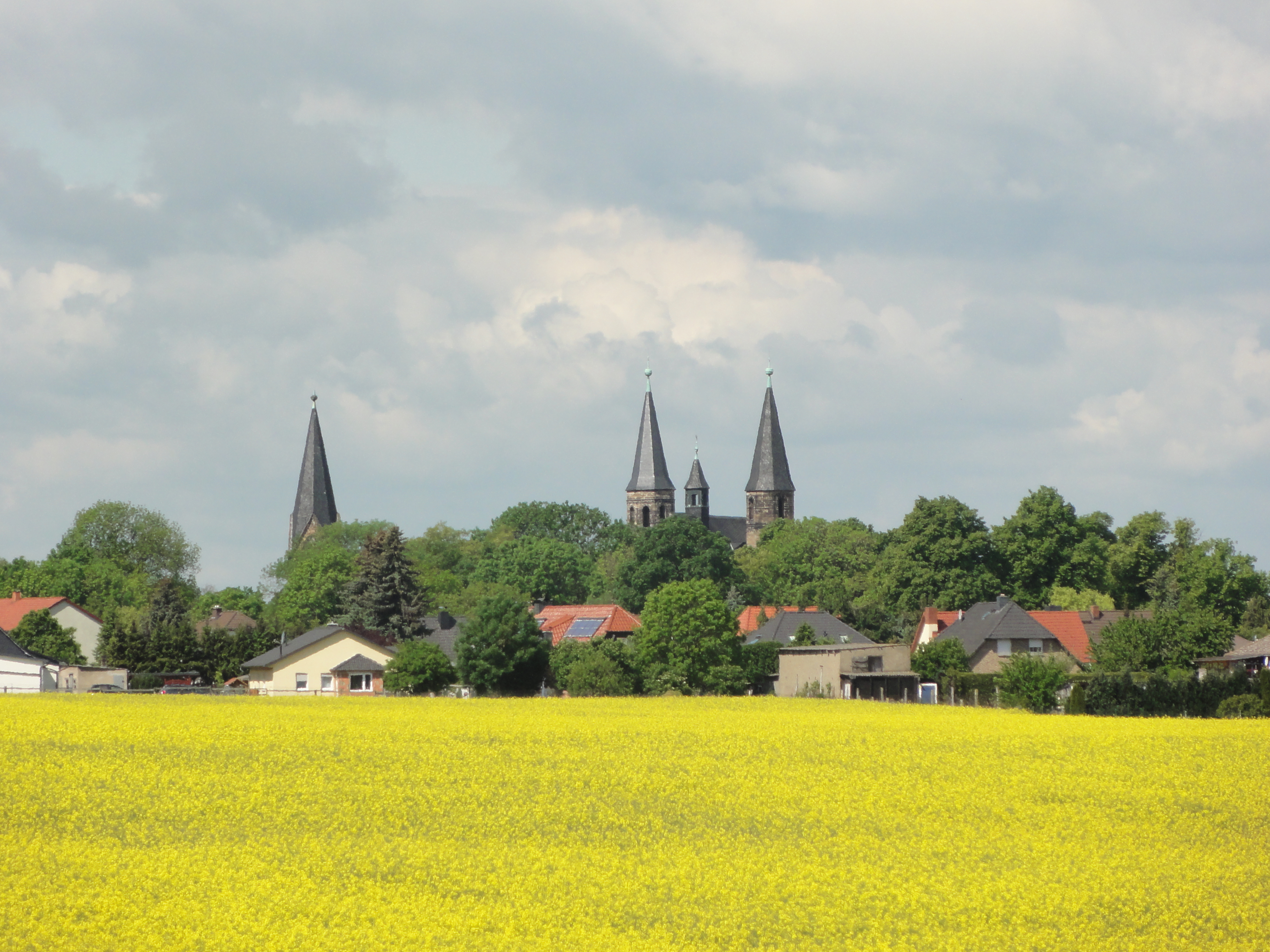 Stiftskirche St. Pankratius Hamersleben (Klosterkirche)